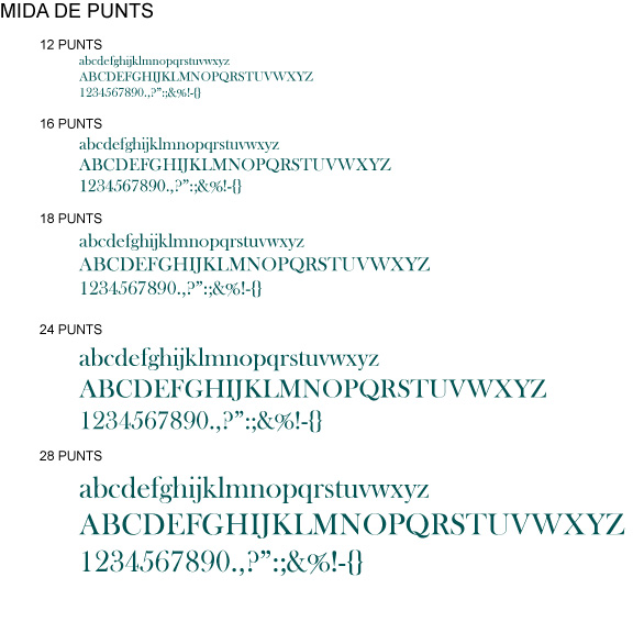 Exemple de la mida de punts en tipografia.